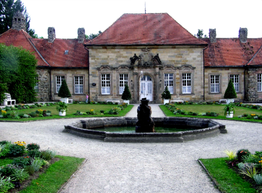 Eremitage, Altes Schloss, Bayreuth, Germany, Springbrunnen